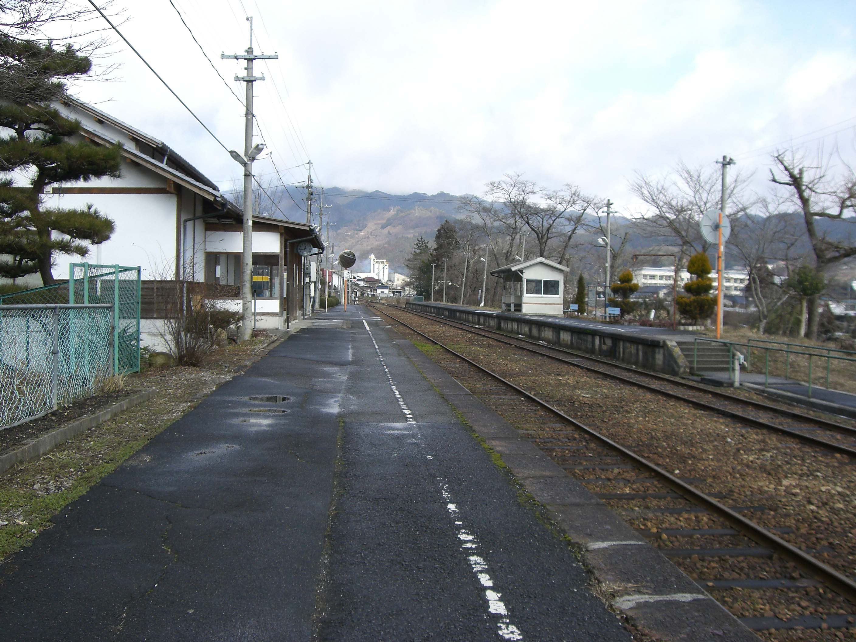 刑部駅の構内